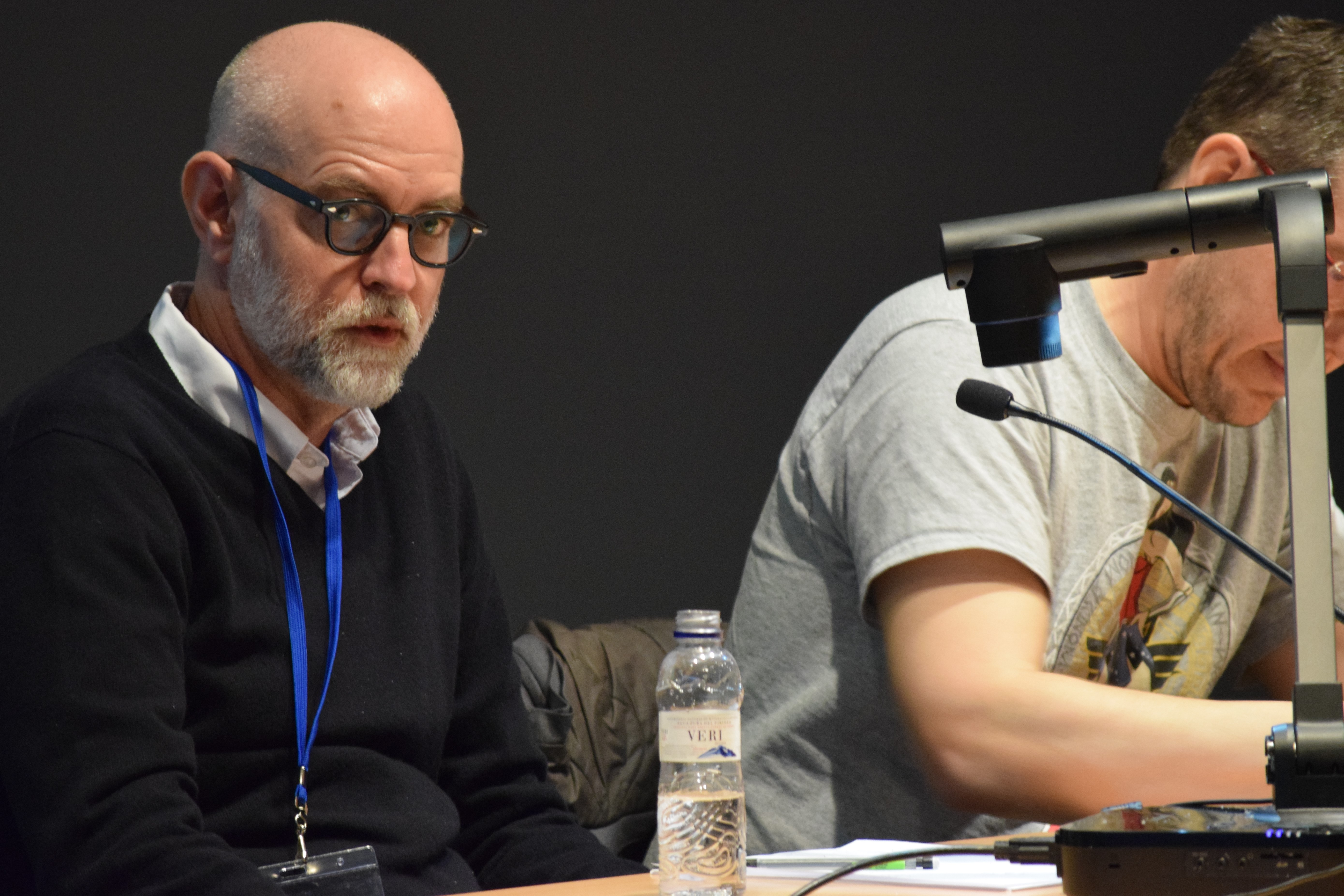 L'autor de còmic underground Daniel Clowes en una taula rodona durant el . 37. Comic Barcelona, 2019.